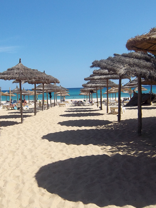 Strand bei Hammamet (Tunesien)